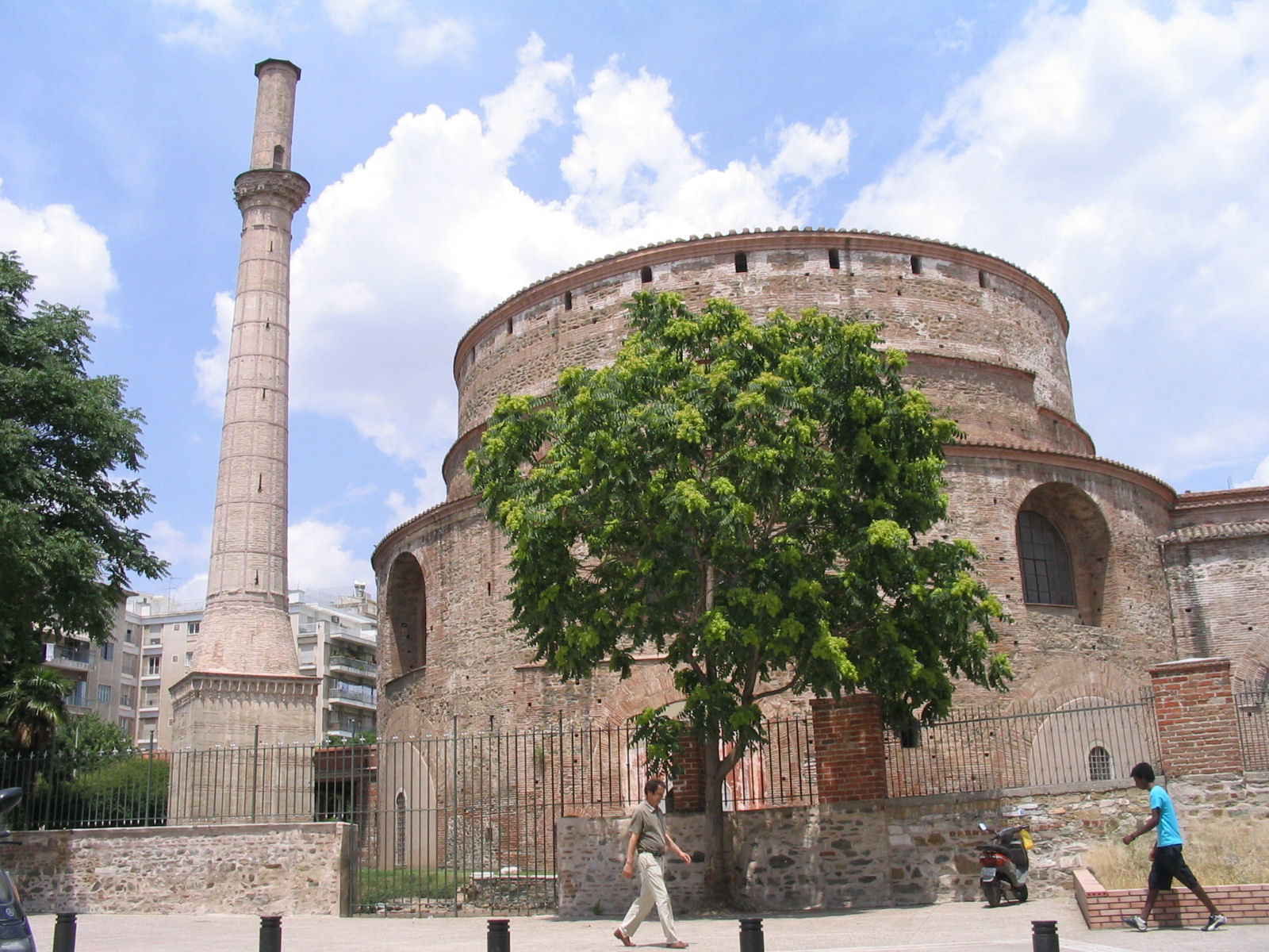 Agios Gorgios (Szt. György) rotunda, Szaloniki